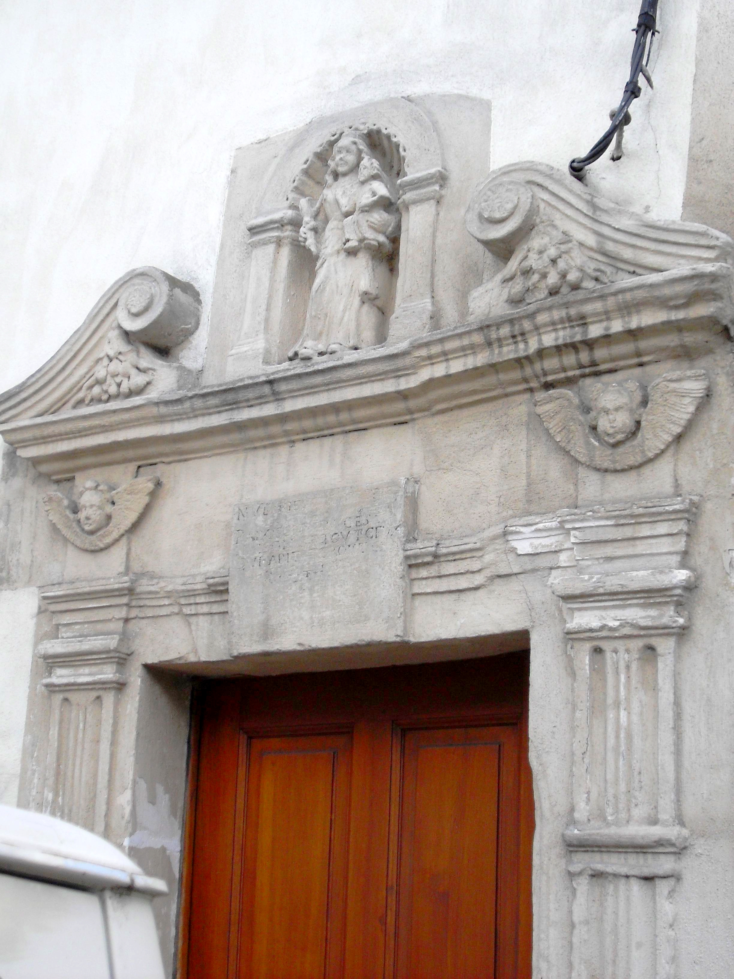 Foug chambranle (ou fronton) de porte sculpté - Maison Kayser classée aux Monuments Historiques le 11 février 1927, située à l'angle de la Grande-Rue et de la rue de l'église, rebaptisée aujourd'hui rue François Mitterrand (Meurthe-et-Moselle).